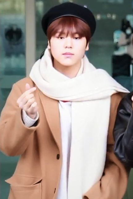 2월 7일 오전 인천시 중구 운서동 인천국제공항에서 이한결, 남도현이 일본 삿뽀로에서 열리는 '12th K-POPFESTIVAL 2020' 참석을 위해 일본으로 출국하고 있다.